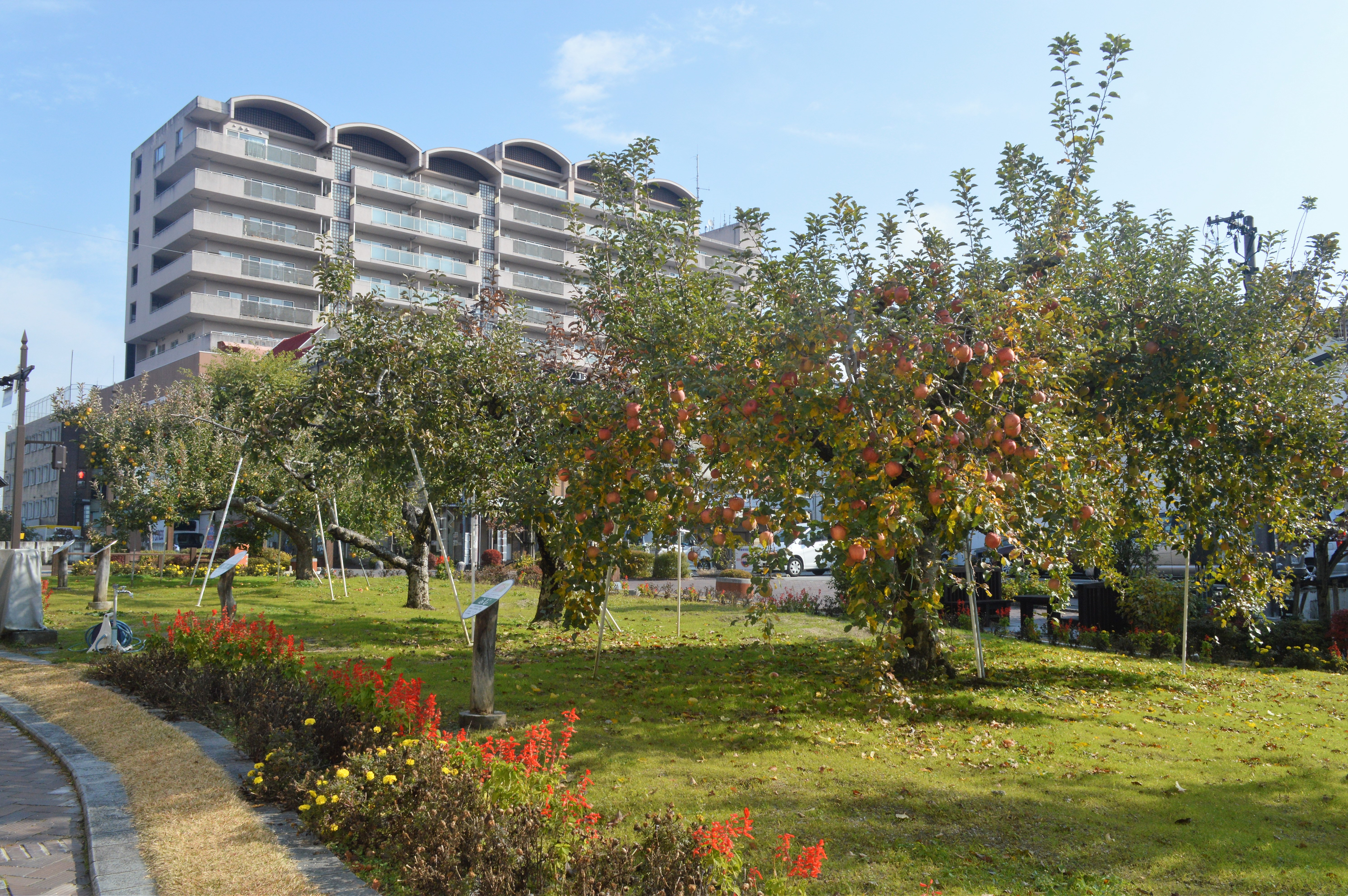 長野県飯田市にある飯田りんご並木。